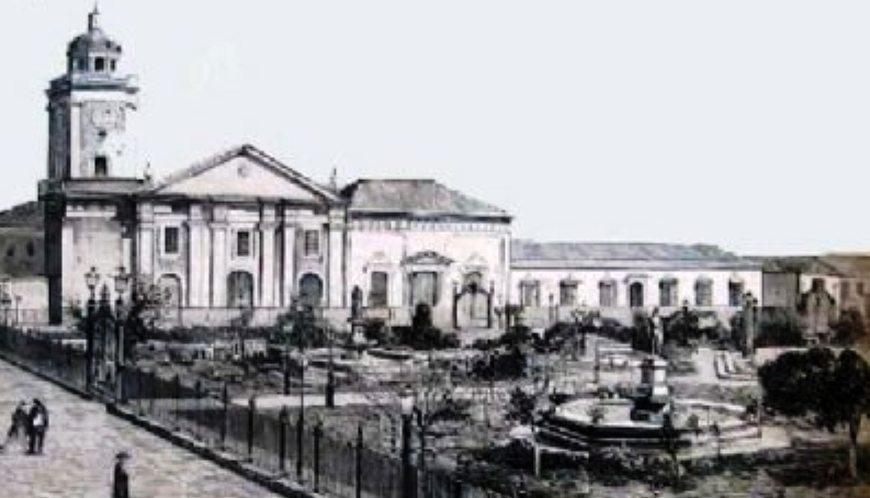 Plaza Mayor de la ciudad de Maracaibo, Venezuela, a mediados del siglo XIX.